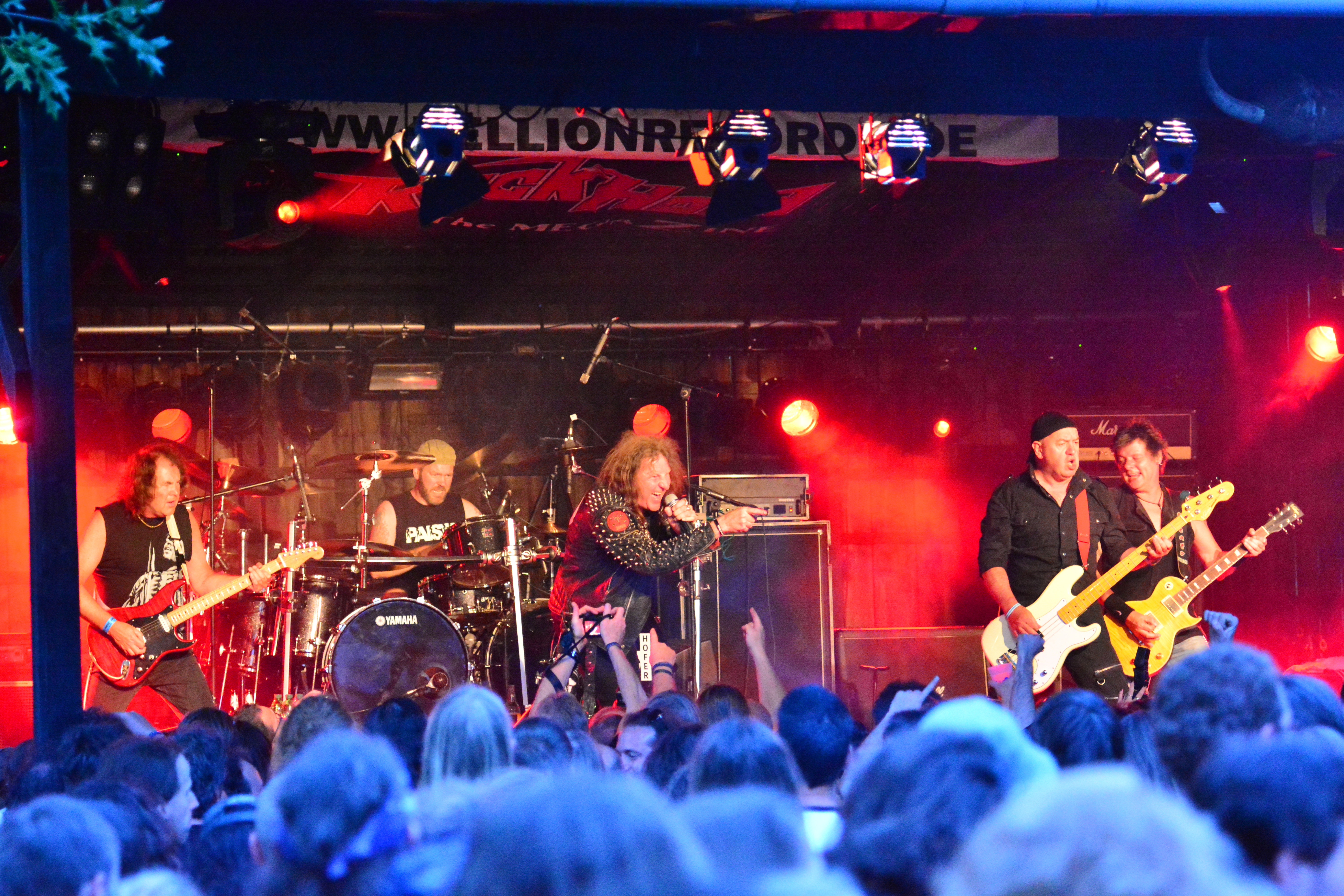 Oliver/Dawson Saxon beim Headbangers Open Air 2014